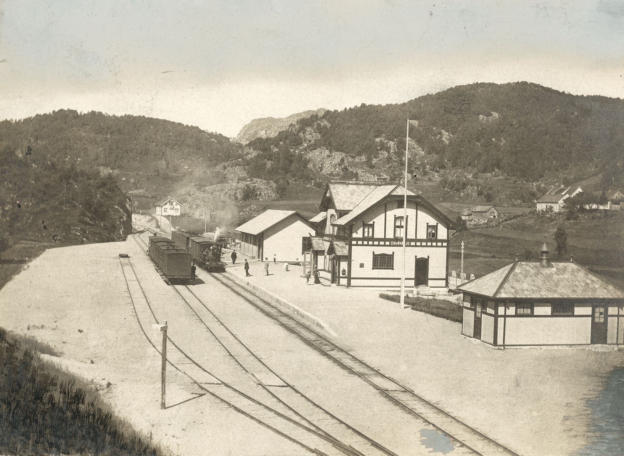 Helleland stasjon på Sørlandsbanen. Arkitekt: Paul Armin Due, oppført 1904 (Sirnes-typen). Ukjent fotograf, fra Riksantikvarens Kulturminnebilder.no.